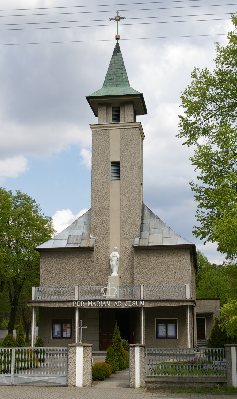 Opole Świerkle - rzymskokatolicki kościół parafialny p.w. Niepokalanego Serca NPM